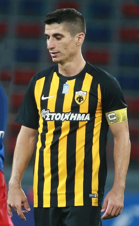 ЦСКА - АЕК